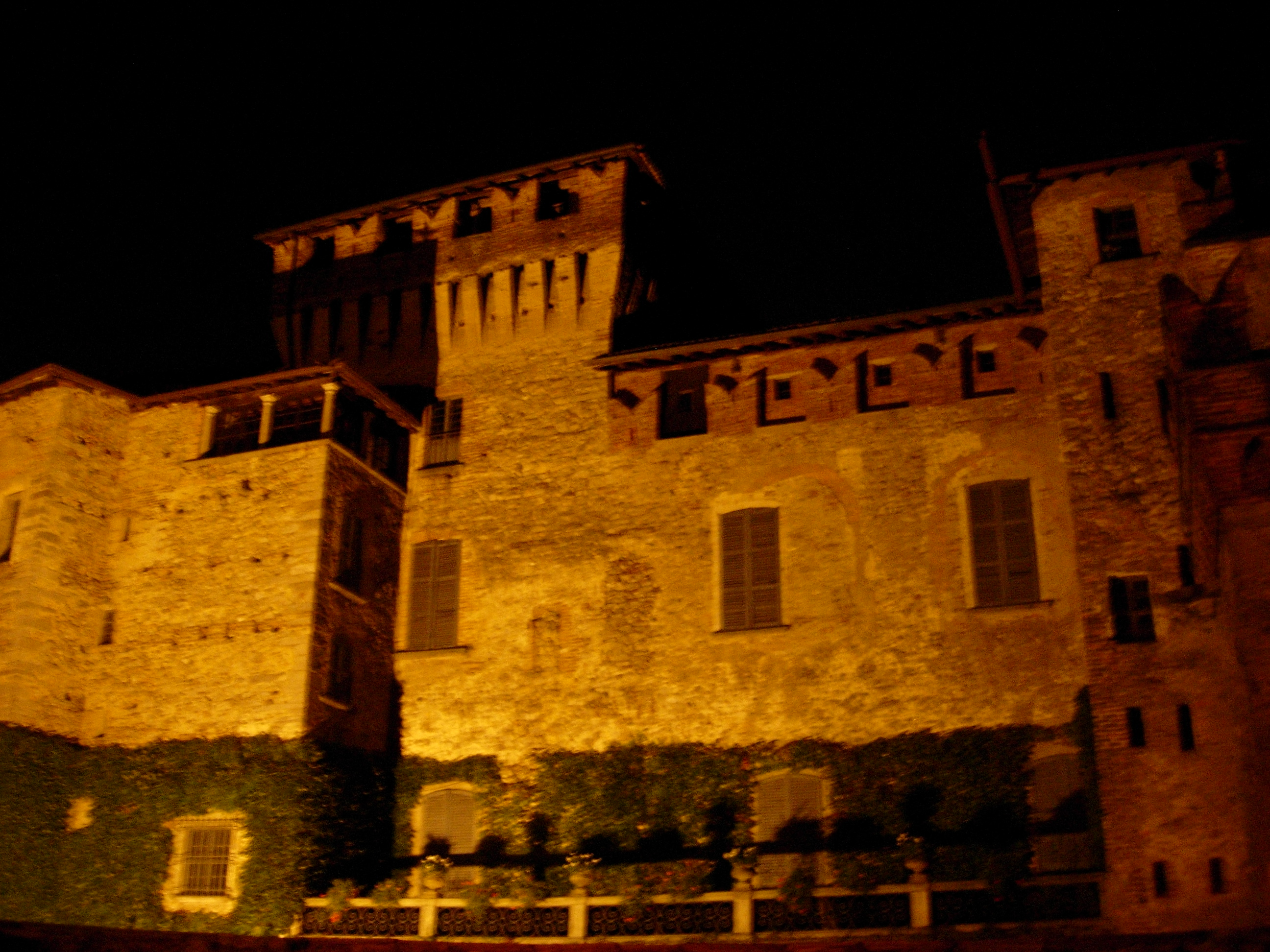 Castello di San Vito , Somma Lombardo VA